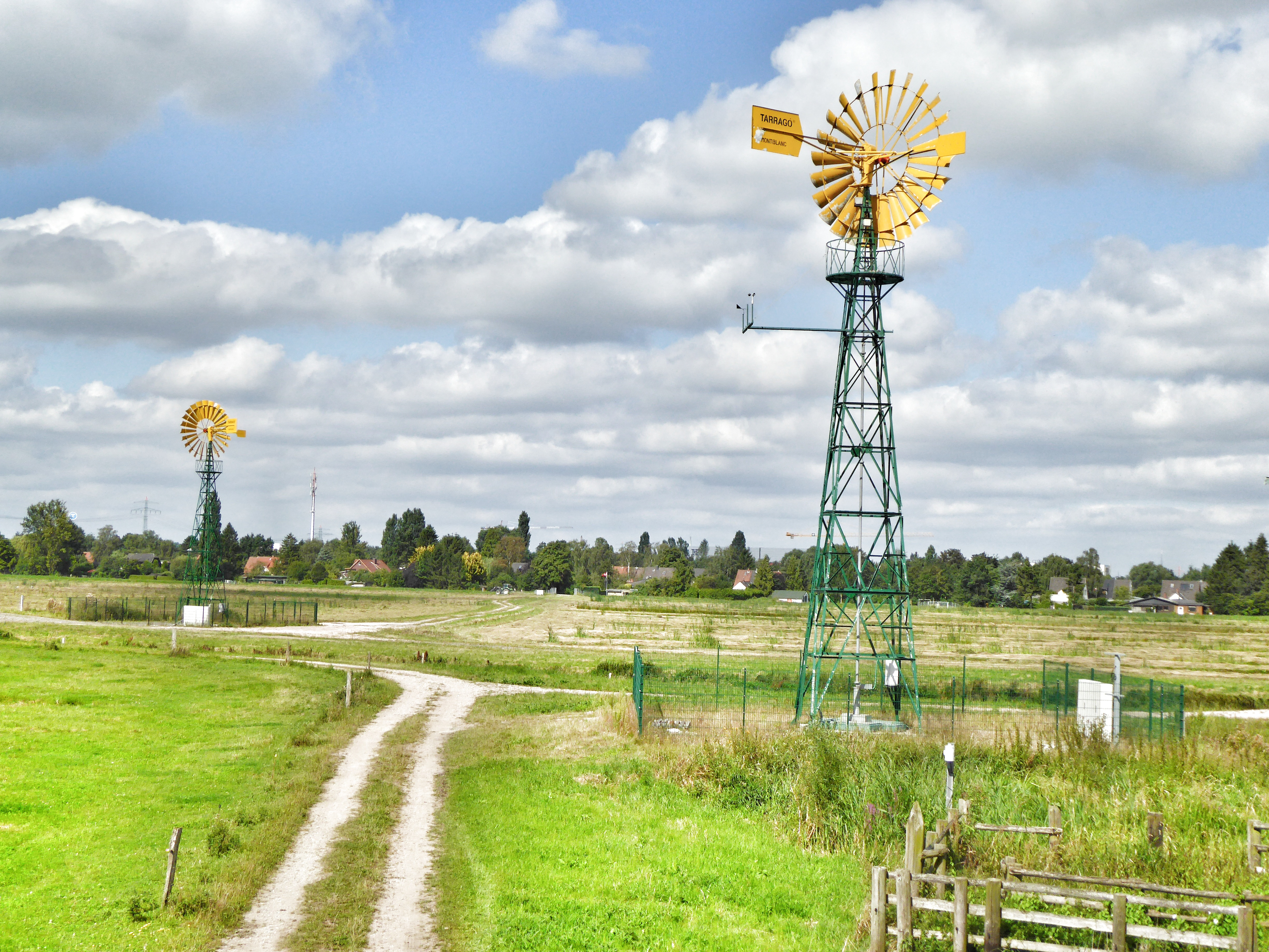 Allermöher Wiesen: Windpumpen zur Bewässerung des Feuchtgrünlandes